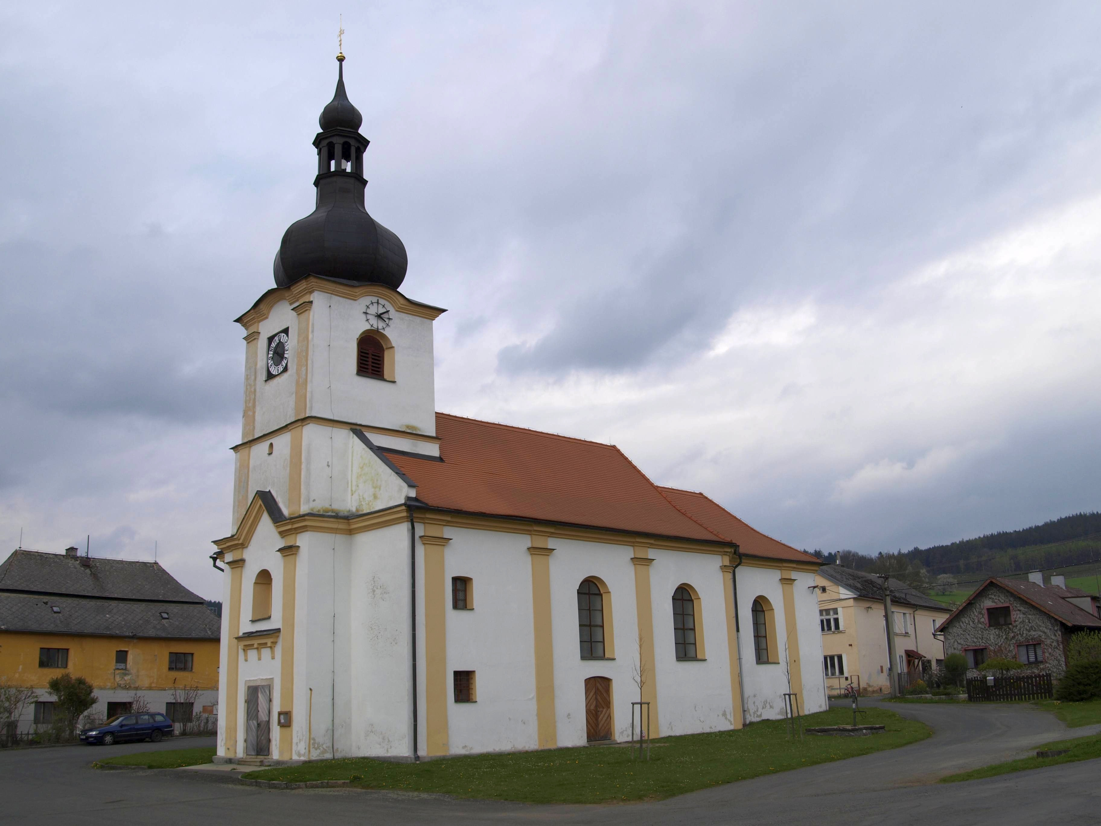 Pocinovice, okres Domažlice, kostel svaté Anny na návsi Project: Fotíme Česko